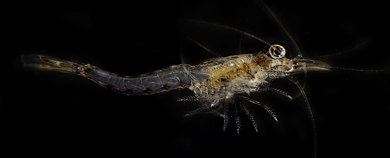 Mysis relicta. Pungreke. Foto: Per Harald Olsen